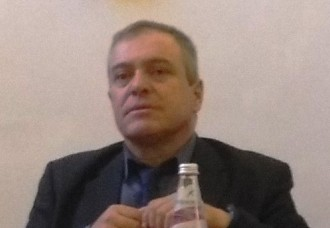 Lorenzo Canova, storico e critico d'arte